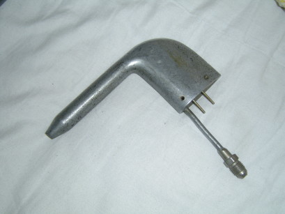 要版權,找我就可以了